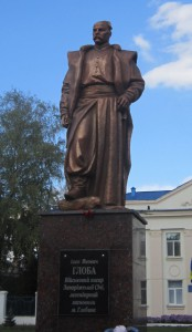 Пам’ятник засновнику м. Глобине, І.Я.Глобі.